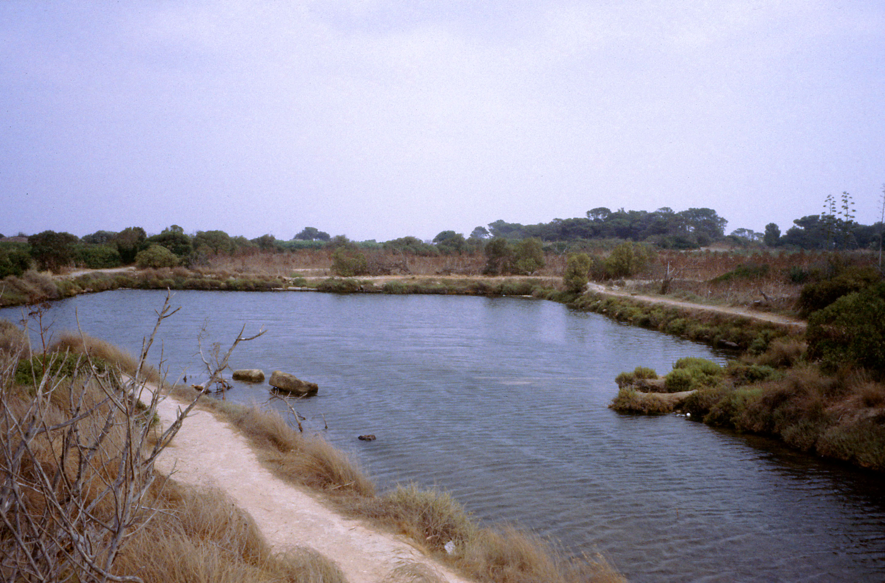 Mozia, Sicilia, il porto interno (cothon), autore Sandro Baldi, Bologna, Italia, estate 1984, fotocamera Konica Autoreflex T